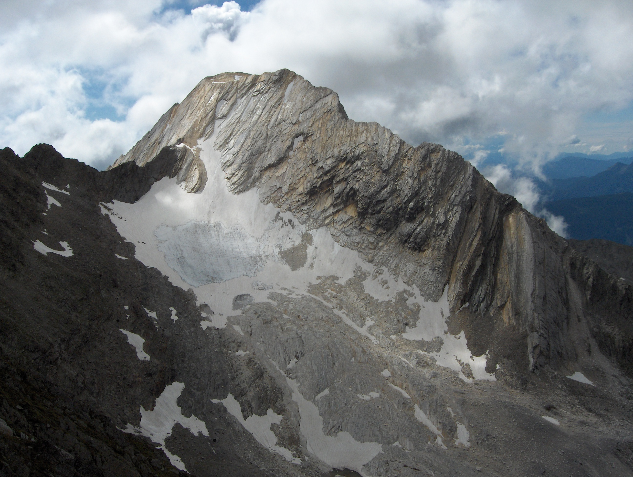 Lodner von der Kleinweißen gesehen